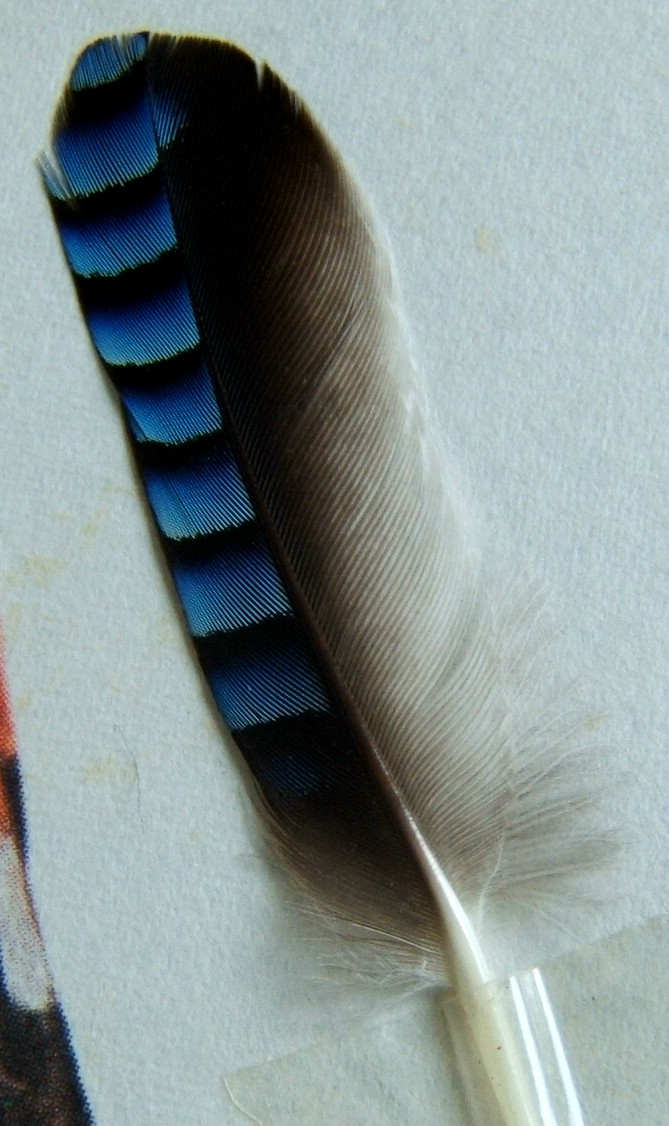 Veertje van de vlaamse gaai, afmeting 4,5 cm